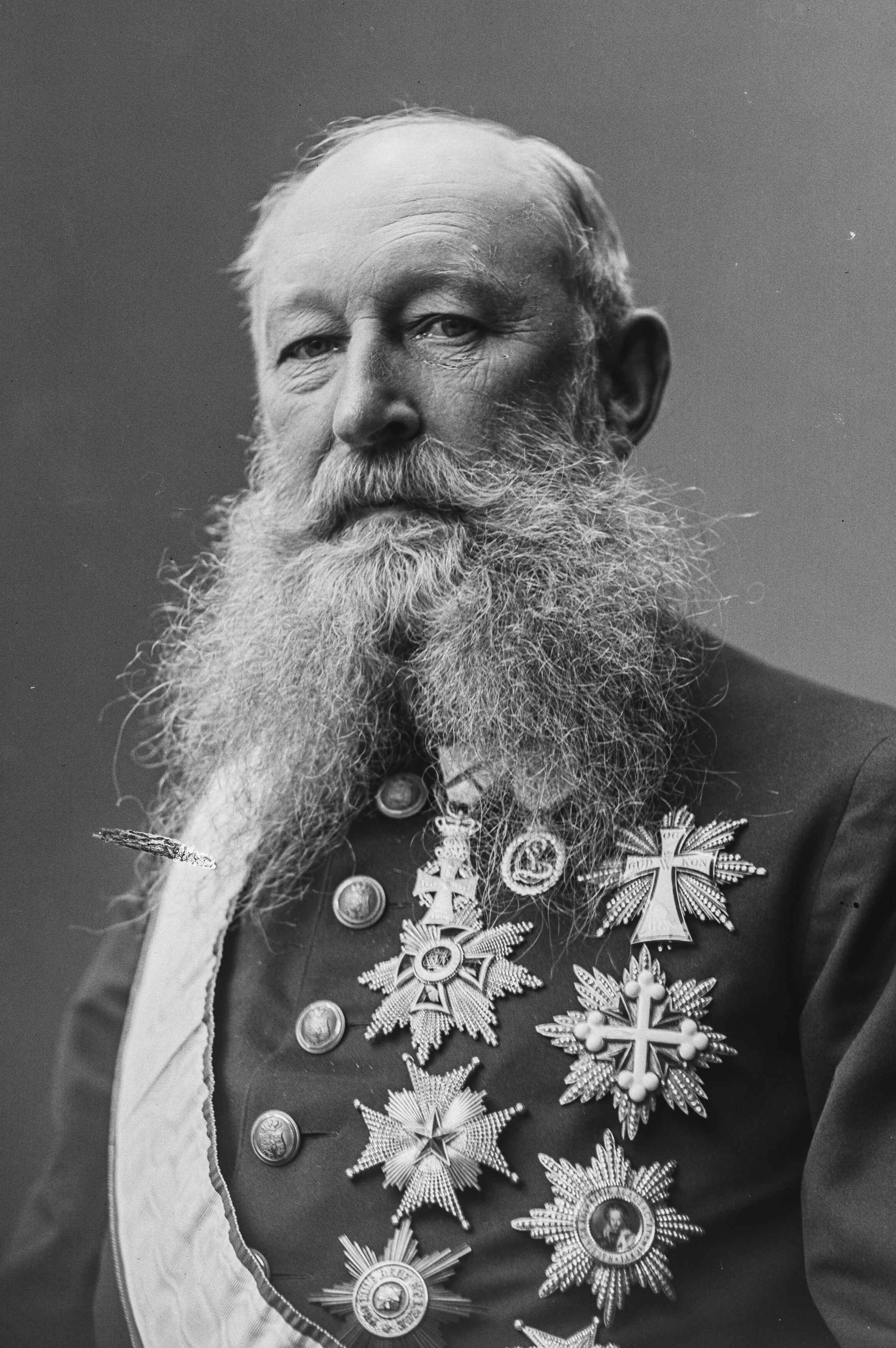 Kjeld Thor Tage Otto Reedtz-Thott, (13. marts 1839 - 27. november 1923) var en dansk politiker. Konseilspræsident 7. august 1894 - 23. maj 1897.